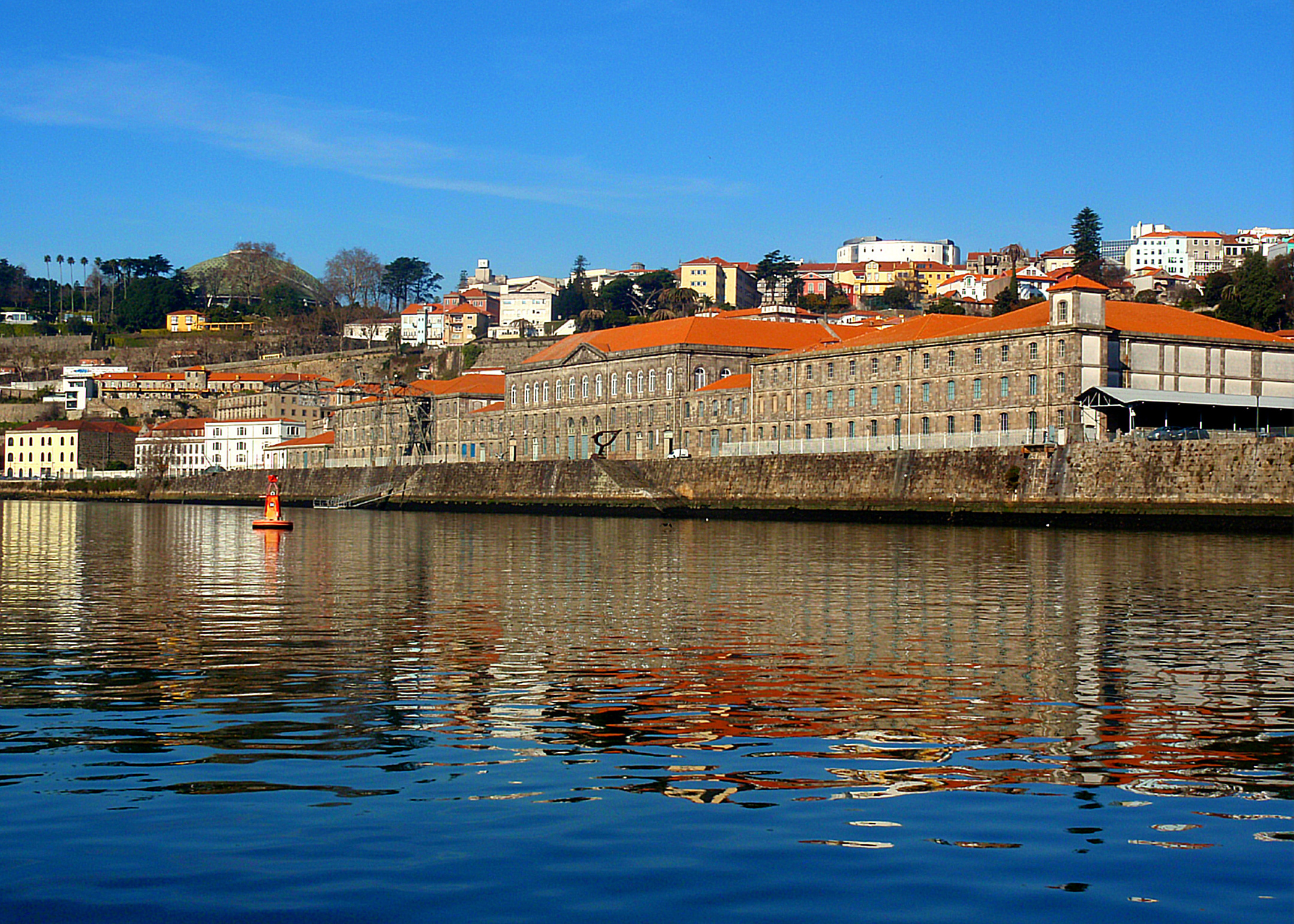 Porto (Portugal)